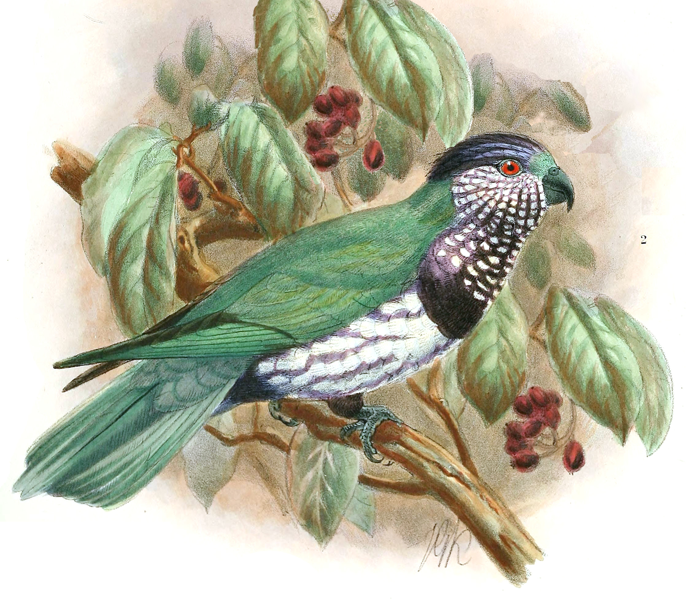 Coriphilus ultramarinus = Vini ultramarina[1]